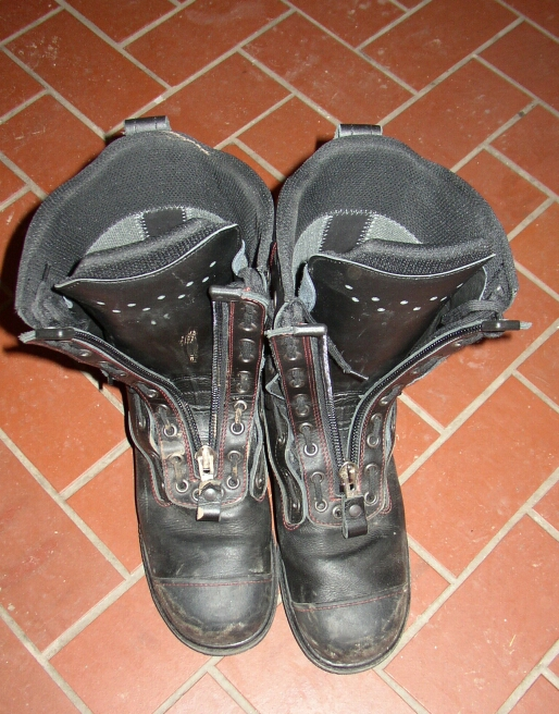 Feuerwehrstiefel